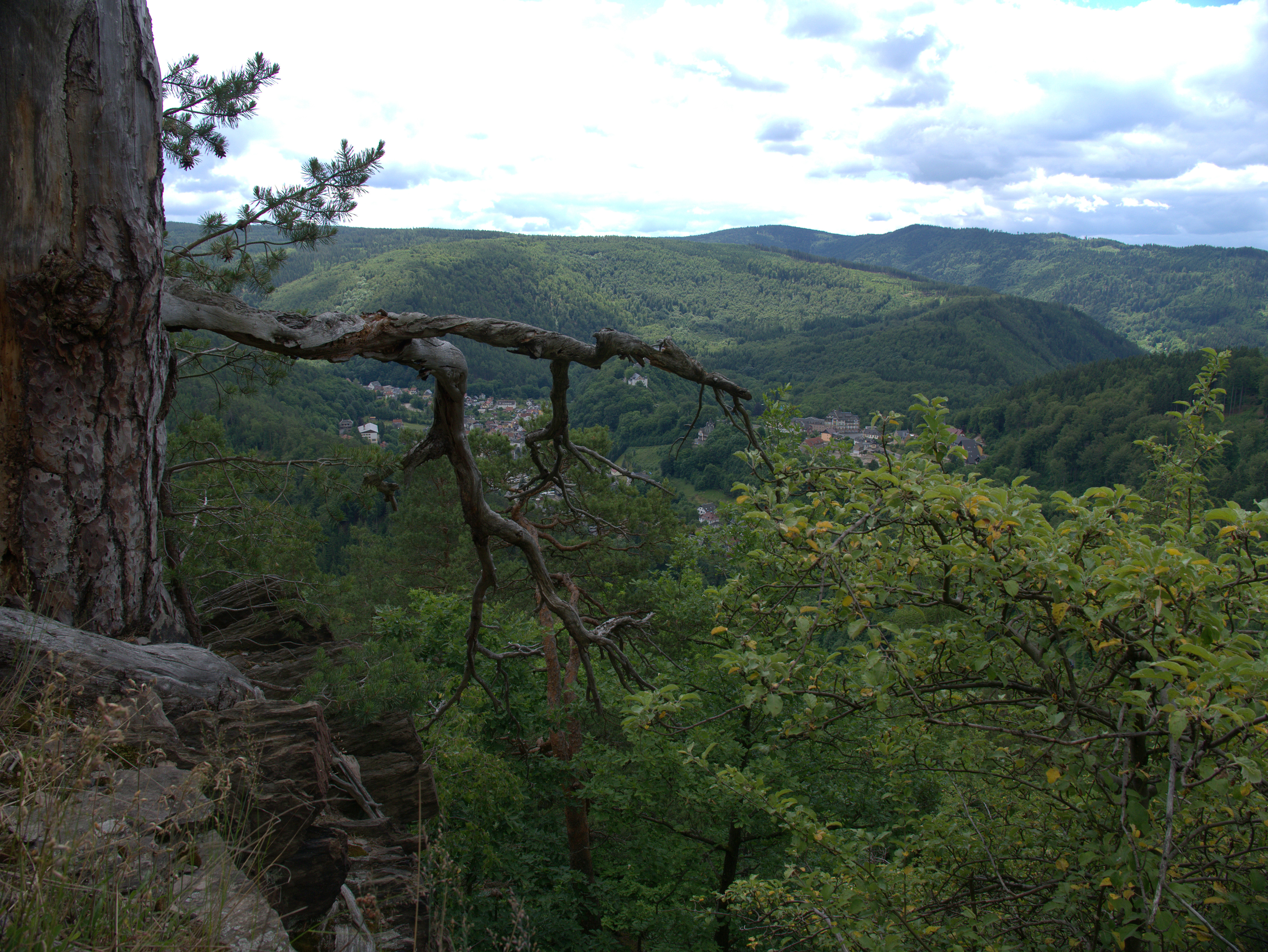 LSG Thüringer Wald Kennung 62 WDPA ID 20896 Schwarzatal Am Trippstein DE-TH